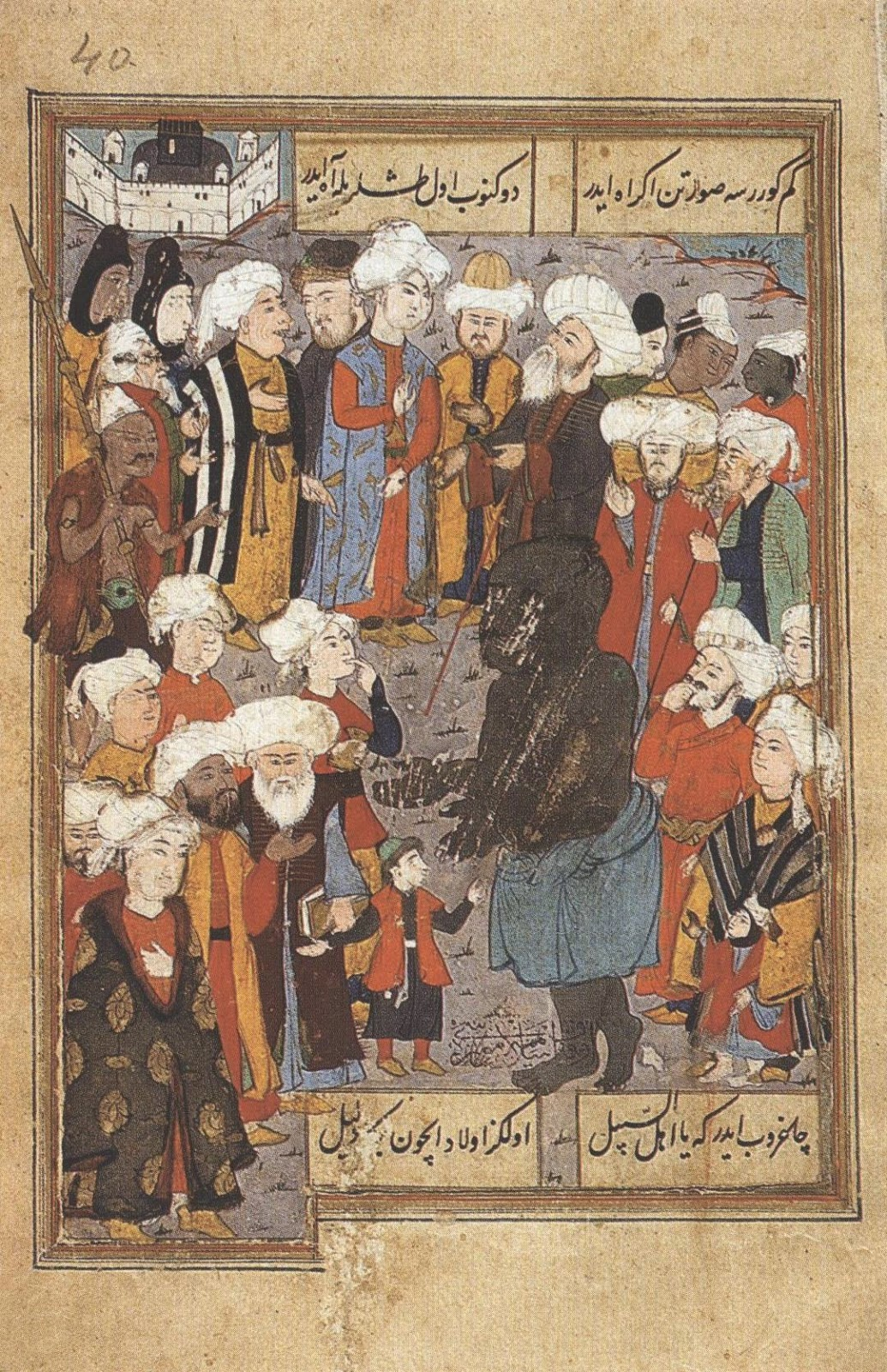 Lâmiî Çelebi'nin Maktel-i Âl-i Resûl eserinden